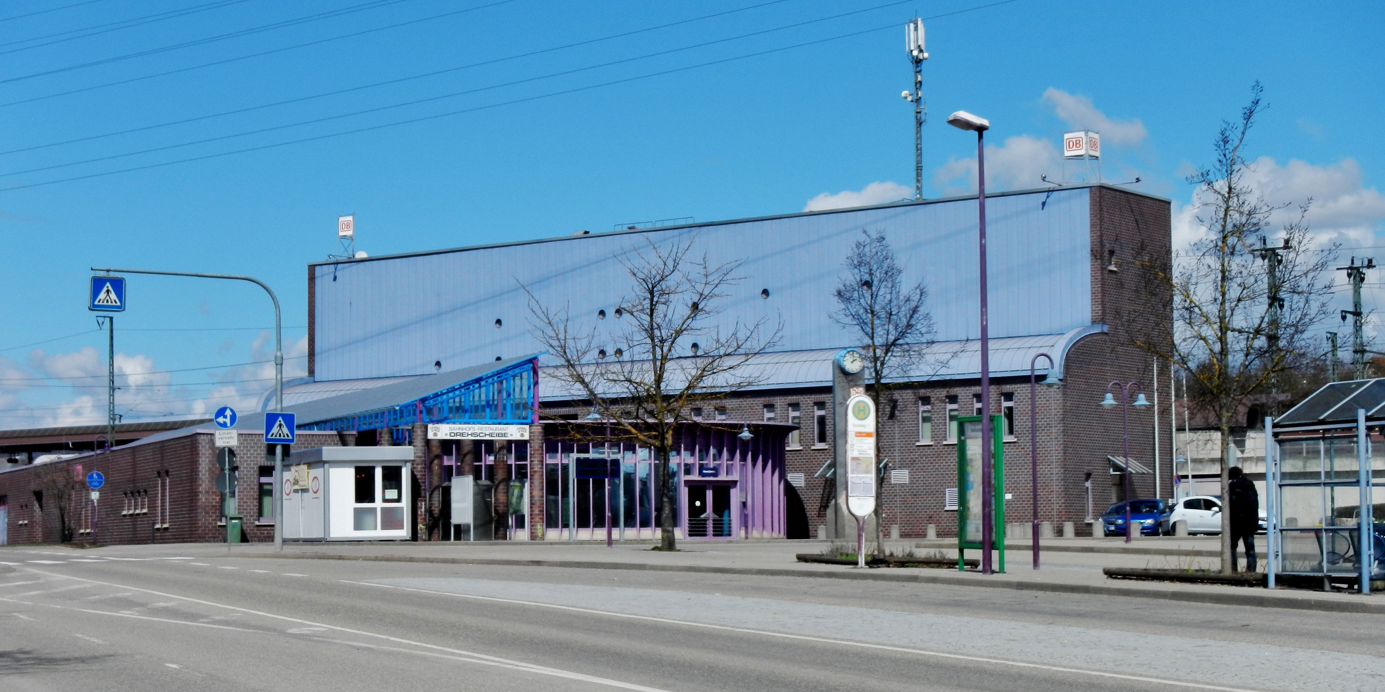 Bahnhof Vaihingen an der Enz